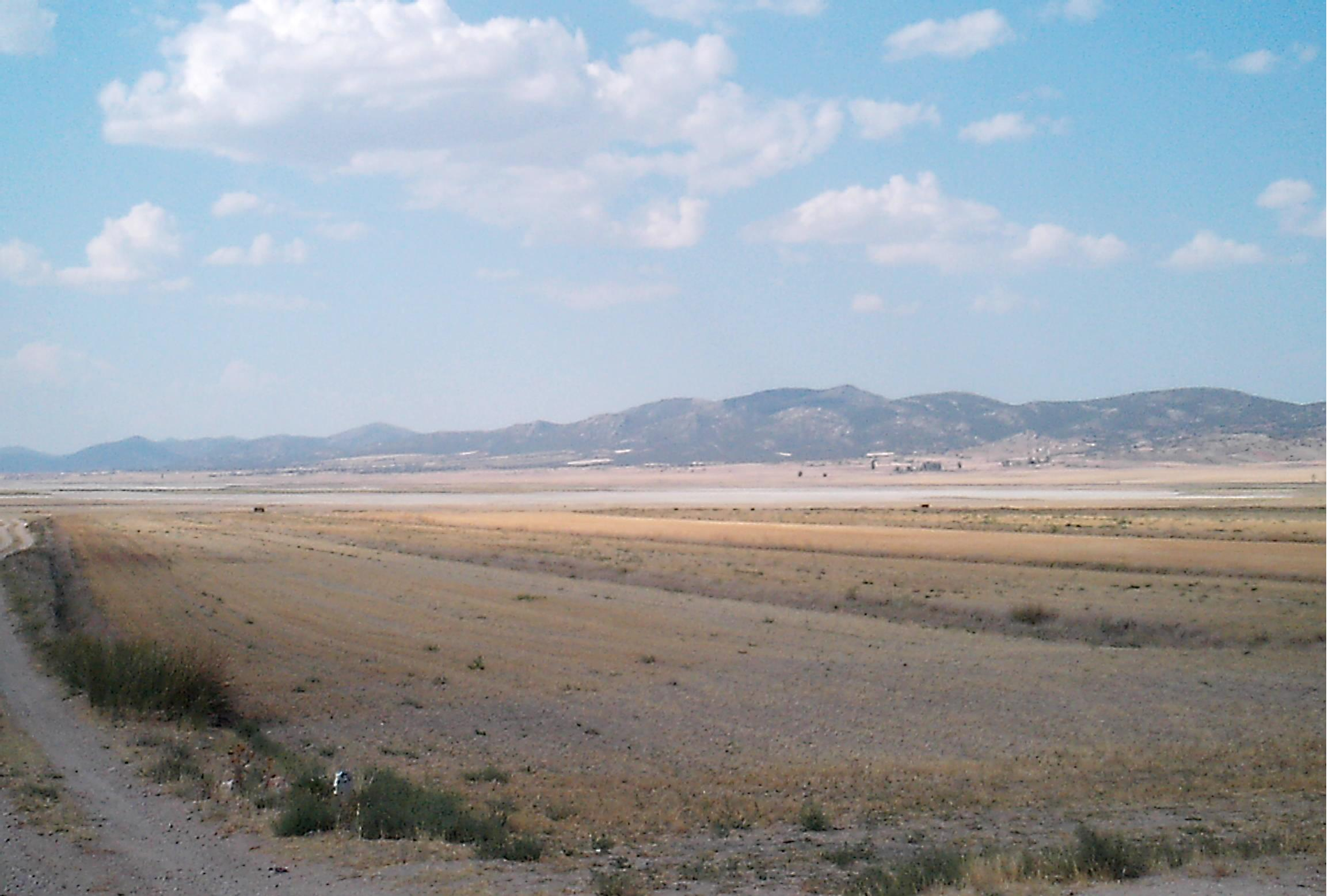 Imagen de la Laguna de Gallocanta desde el centro de Interpretación